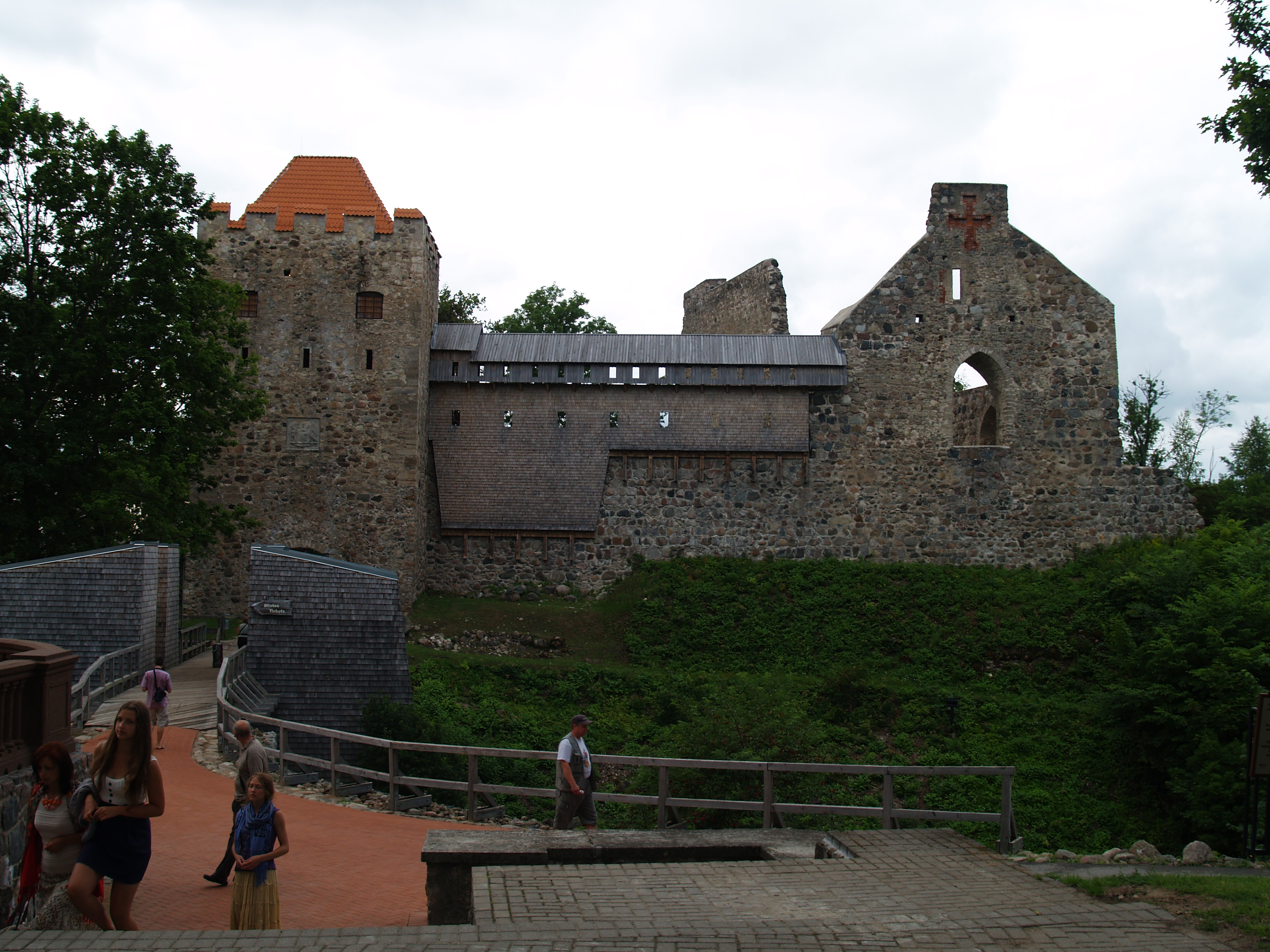 Sigulda ordulinnuse mõisapoolne sissekäik